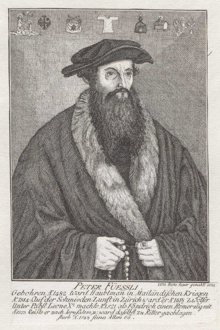 Peter Füssli, Brustbildnis mit Darstellung als Pilger. Die Embleme am oberen Bildrand verweisen auf Stationen der Pilgerreise. Darstellung in Art der Bildnisse des 16. Jahrhunderts. Radierung, Zürich um 1770.